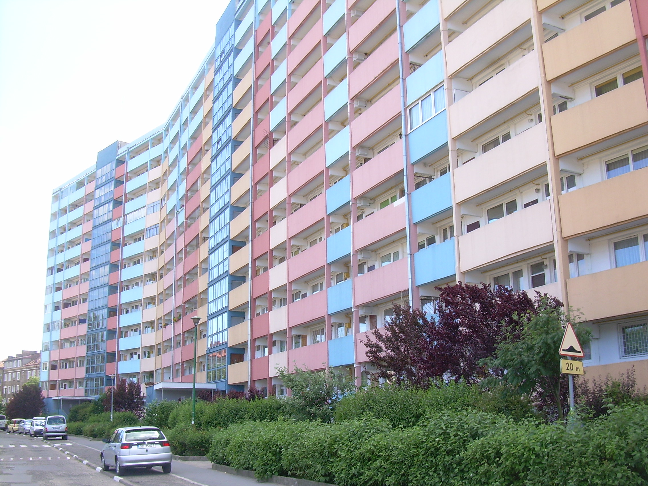 Gdańsk Nowy Port, ul. Wyzwolenia 51.